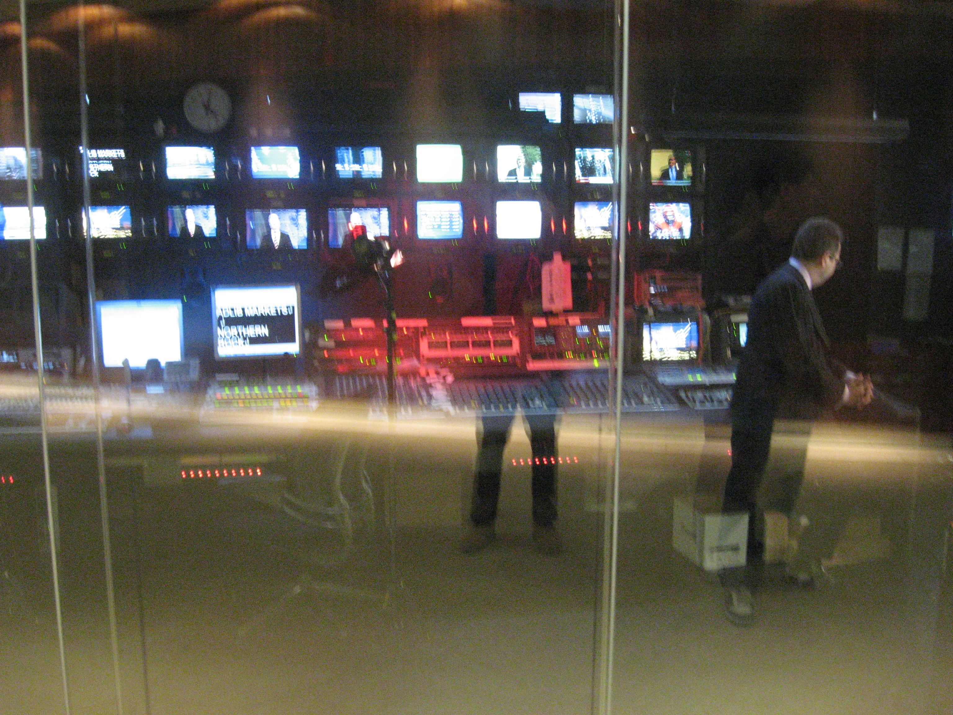 London Stock Exchange